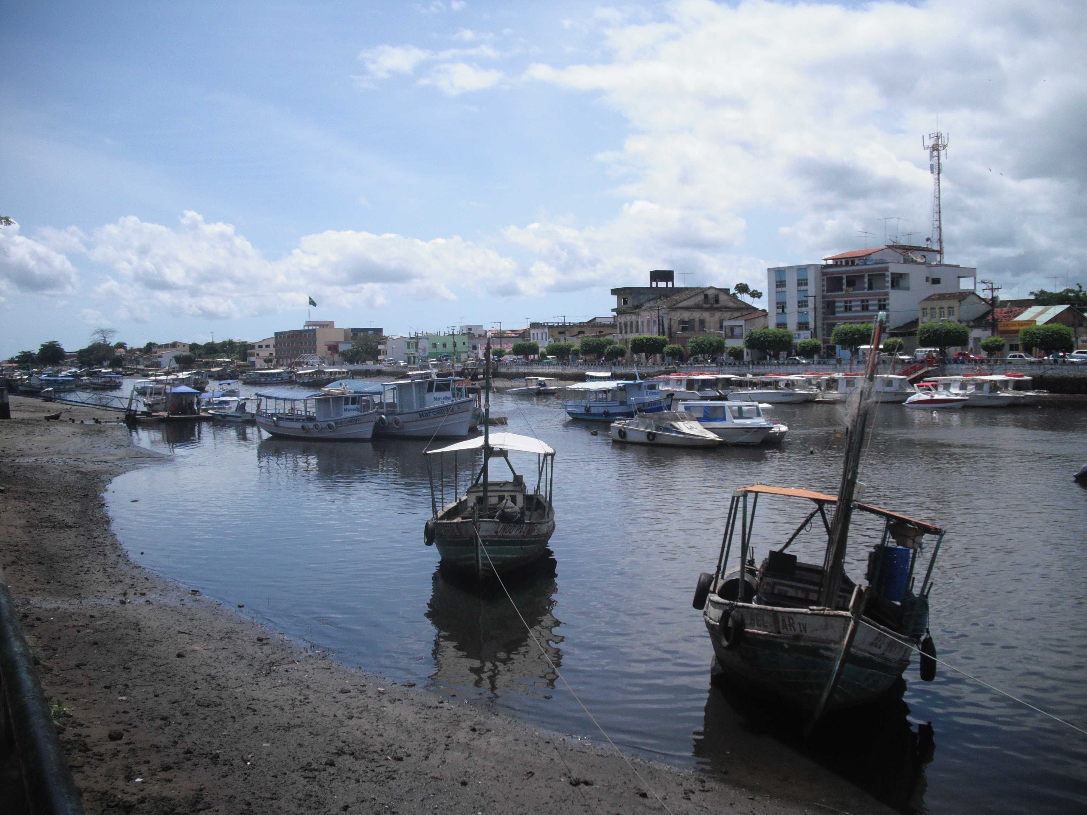 Centro de Valença, Bahia, Brasil.